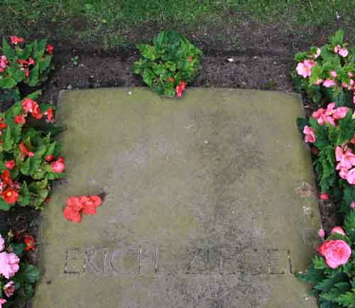 Die Grabstätte von Erich Ziegel und seiner Ehefrau Mirjam Ziegel-Horwitz (Inschrift im unteren Grabsteinabschnitt) auf dem Friedhof Ohlsdorf in Hamburg, Planquadrat P 7, 13 (am oberen Rand des Althamburgischen Gedächtnisfriedhofs)